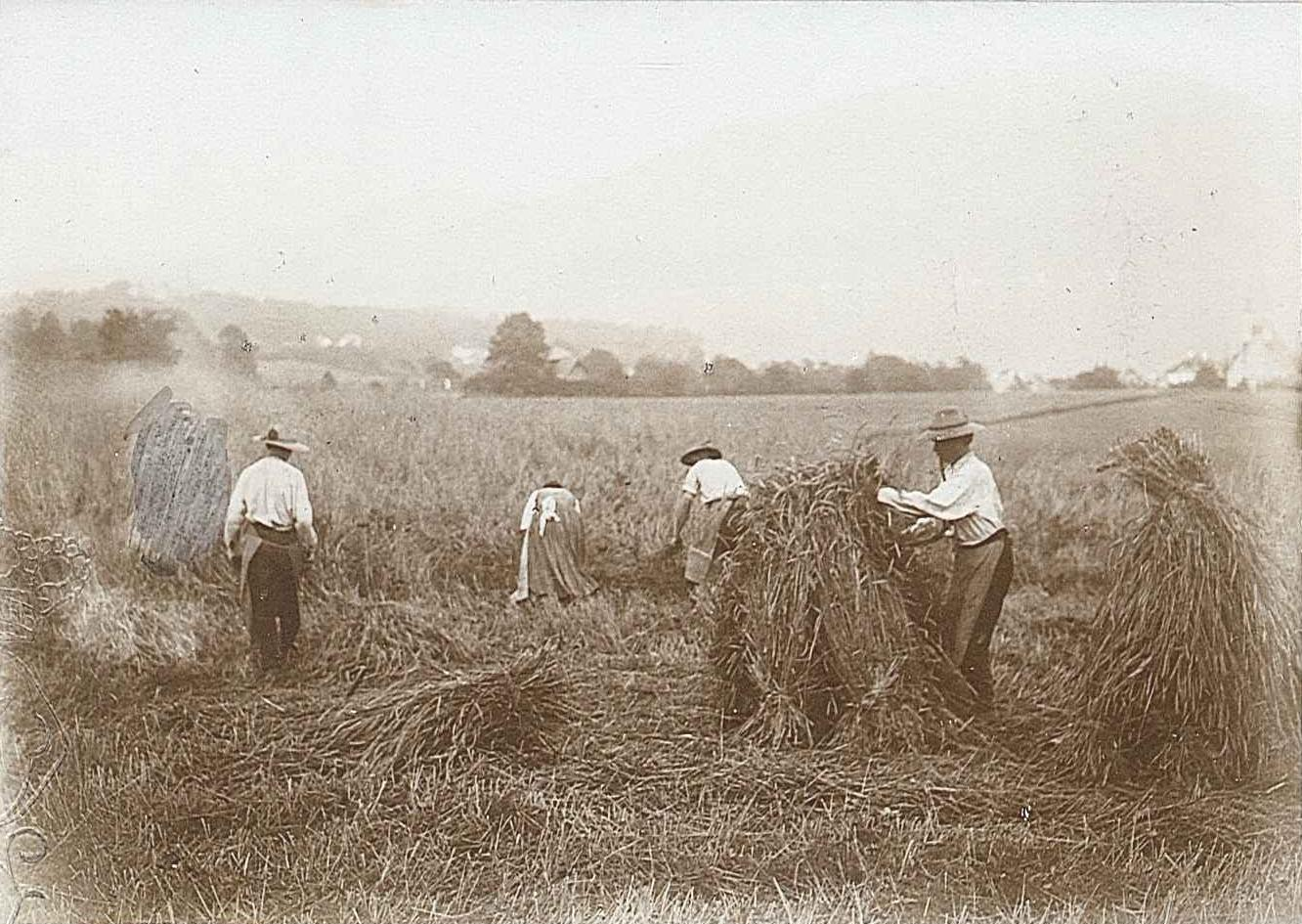 Dans les blés, près du calvarie d'Altmünster (Autriche). Photojumelle Carpentier